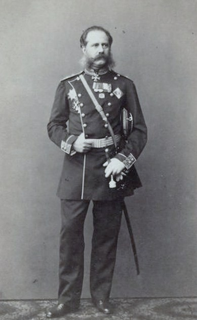 А. И. Барятинский